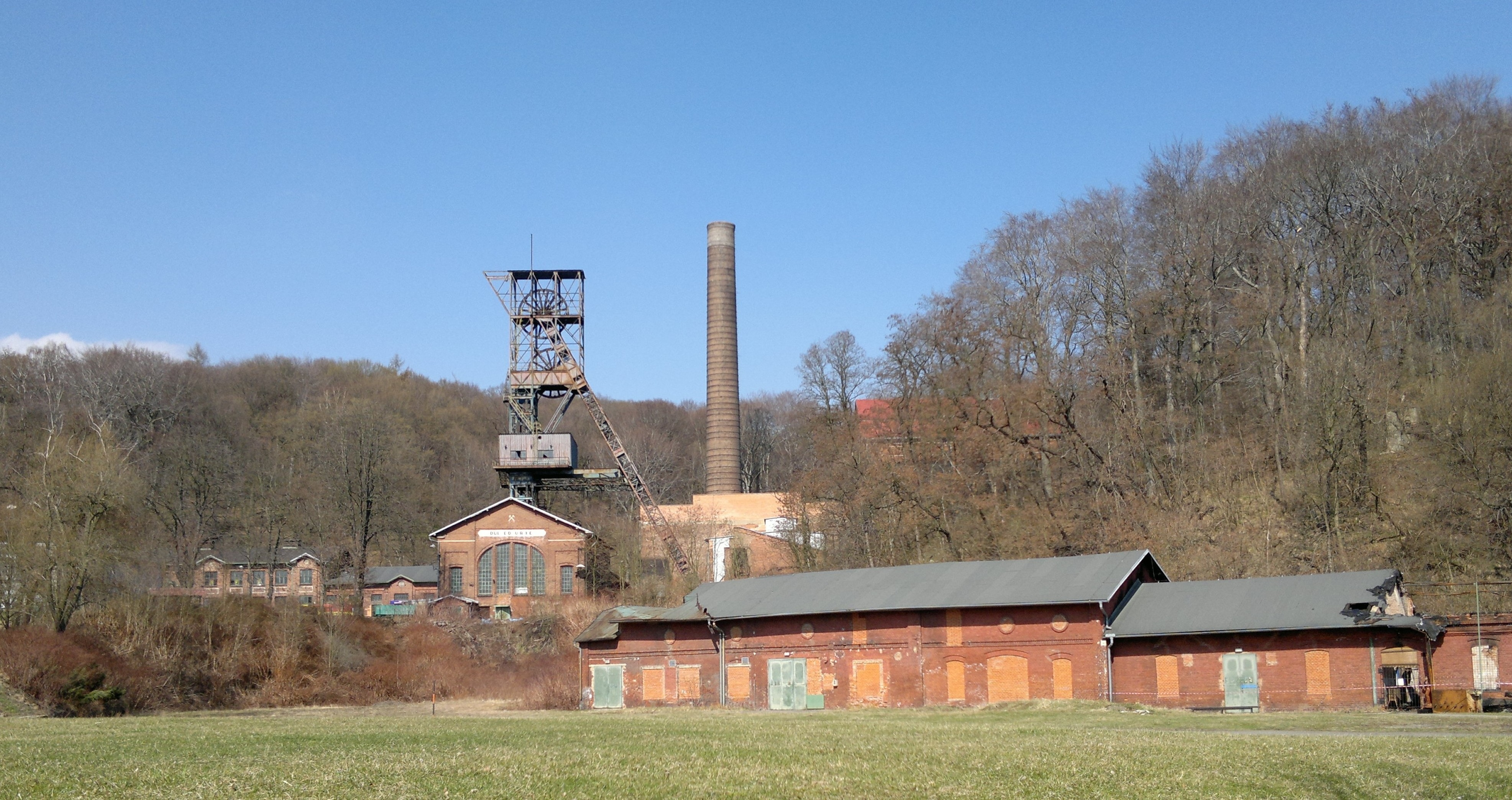 Důl Anselm (Ed. Urx); Ostrava (CZ)